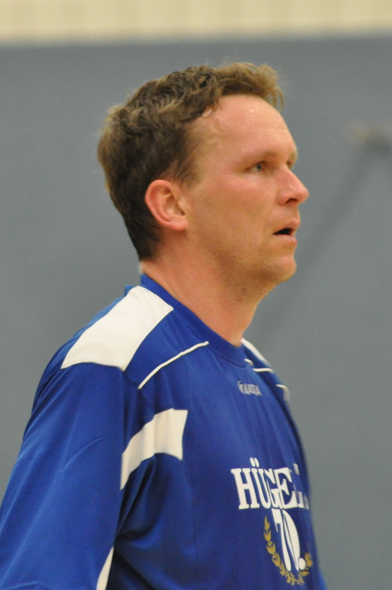 Deutsche Handballspieler am 10. Dezember 2010 in der "Sporthalle am Mühlenberg" in Ribnitz-Damgarten bei einem Spiel zu Ehren des 70. Geburtstages des ehemaligen Physiotherapeuten der deutschen Männer-Handballnationalmannschaft Klaus Bergmeier. Hier: Ronald Bahr